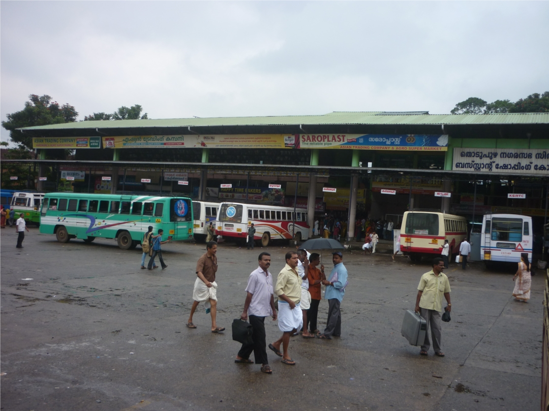 തൊടുപുഴ ഇടുക്കി ജില്ലയിലെ പ്രധാന മുനിസിപ്പാലിറ്റിയും പട്ടണവുമാണ്.